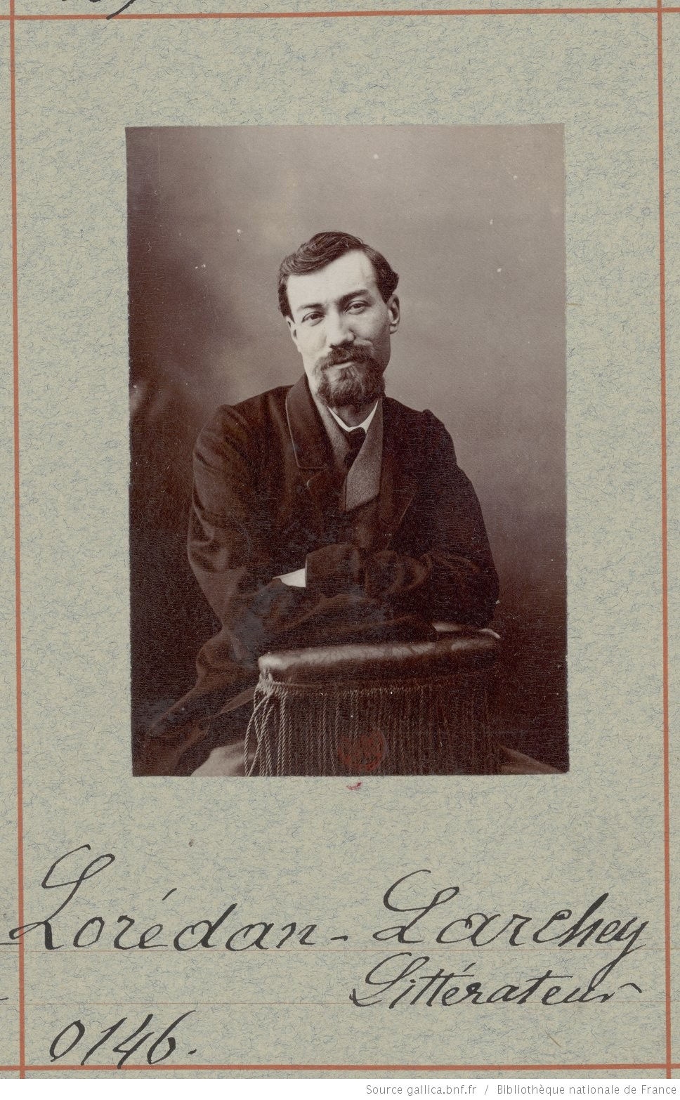 Portrait photographique d'Étienne Lorédan-Larchey (1831-1902) jeune. attribuée à l'atelier Nadar